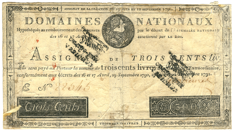 Faux assignat de 300 livres, portant au dos le cachet d'époque : « Assignat certifié faux - Deperey - Vérificateur en Chef »